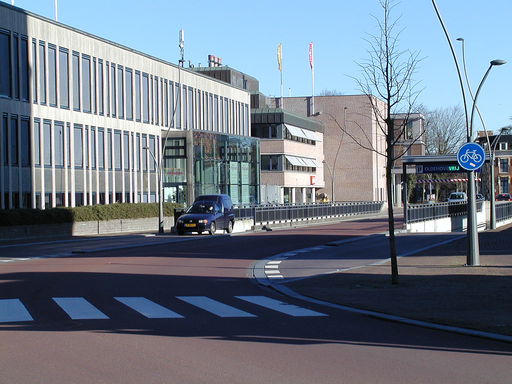 De gebouwen van Tresoar, Fries Historisch en Letterkundig Centrum in Leeuwarden aan de Boterhoek.